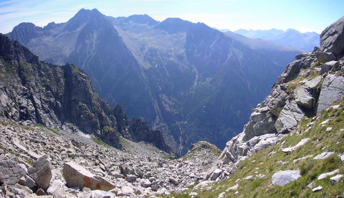 Vall de Comalesbienes vista des del Barranc de Comaloforno; la Vall de Boí, Alta Ribagorça, Catalunya